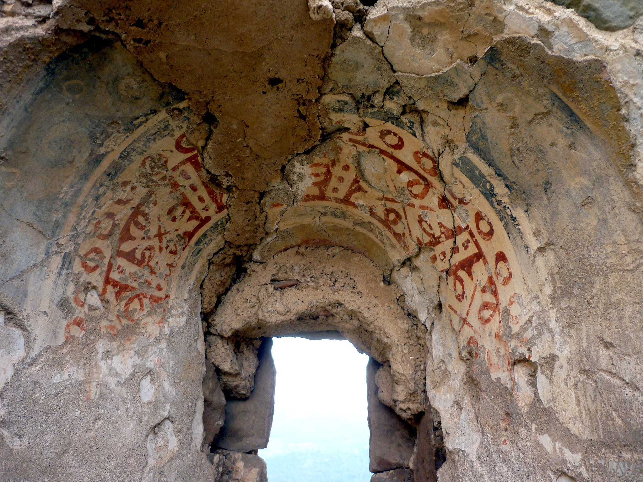 Sant Martí de la Figuera de l'Aguda (Vilanova de l'Aguda). Pintures a la finestra de l'absis